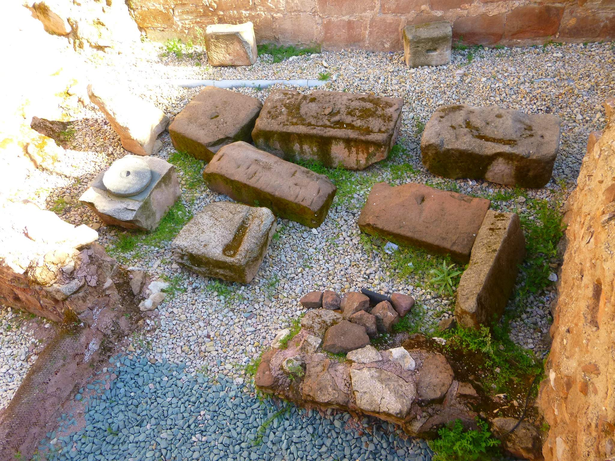 Yacimiento arqueológico romano de Alcázar de San Juan (Ciudad Real)